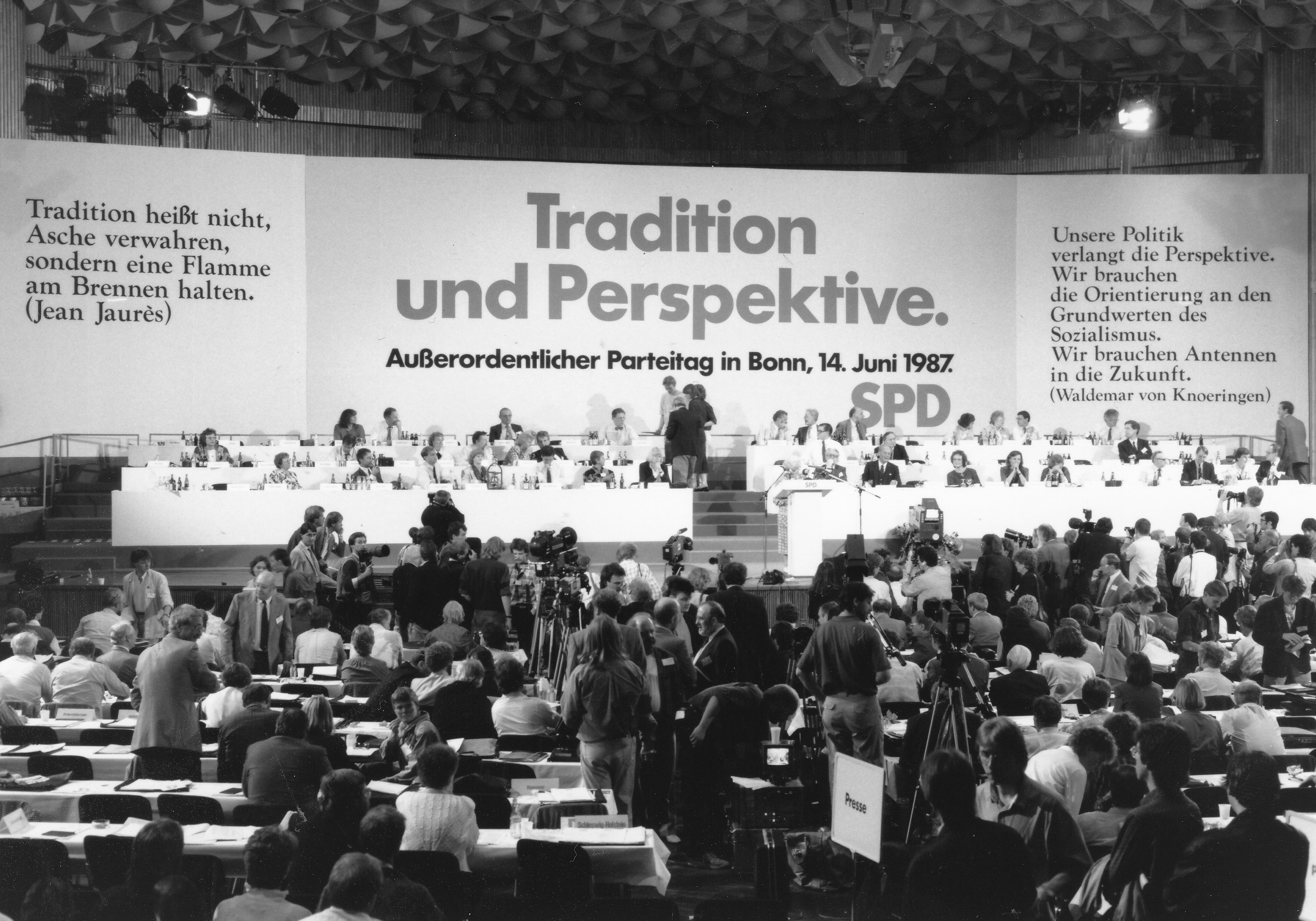 Außerordentlicher Parteitag der SPD in Bonn am 14. Juni 1987